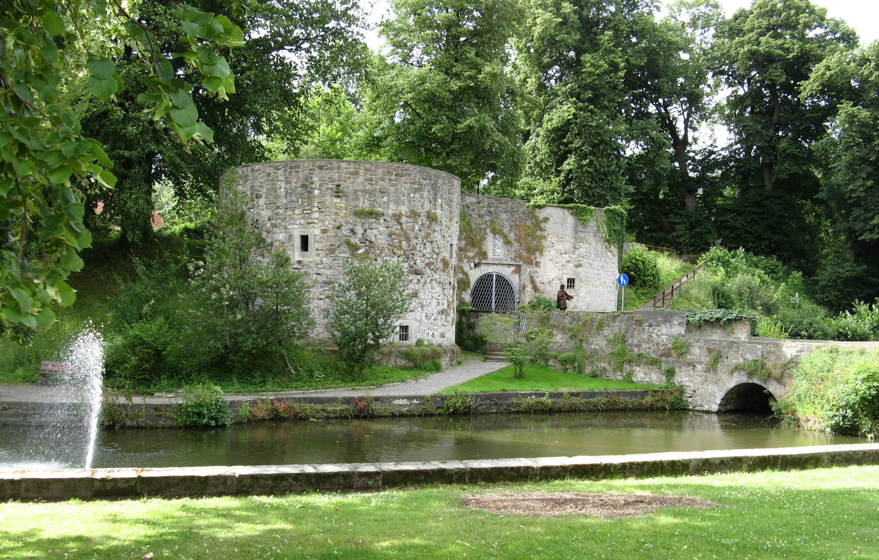 Die Burg Coppenbrügge von schräg vorne